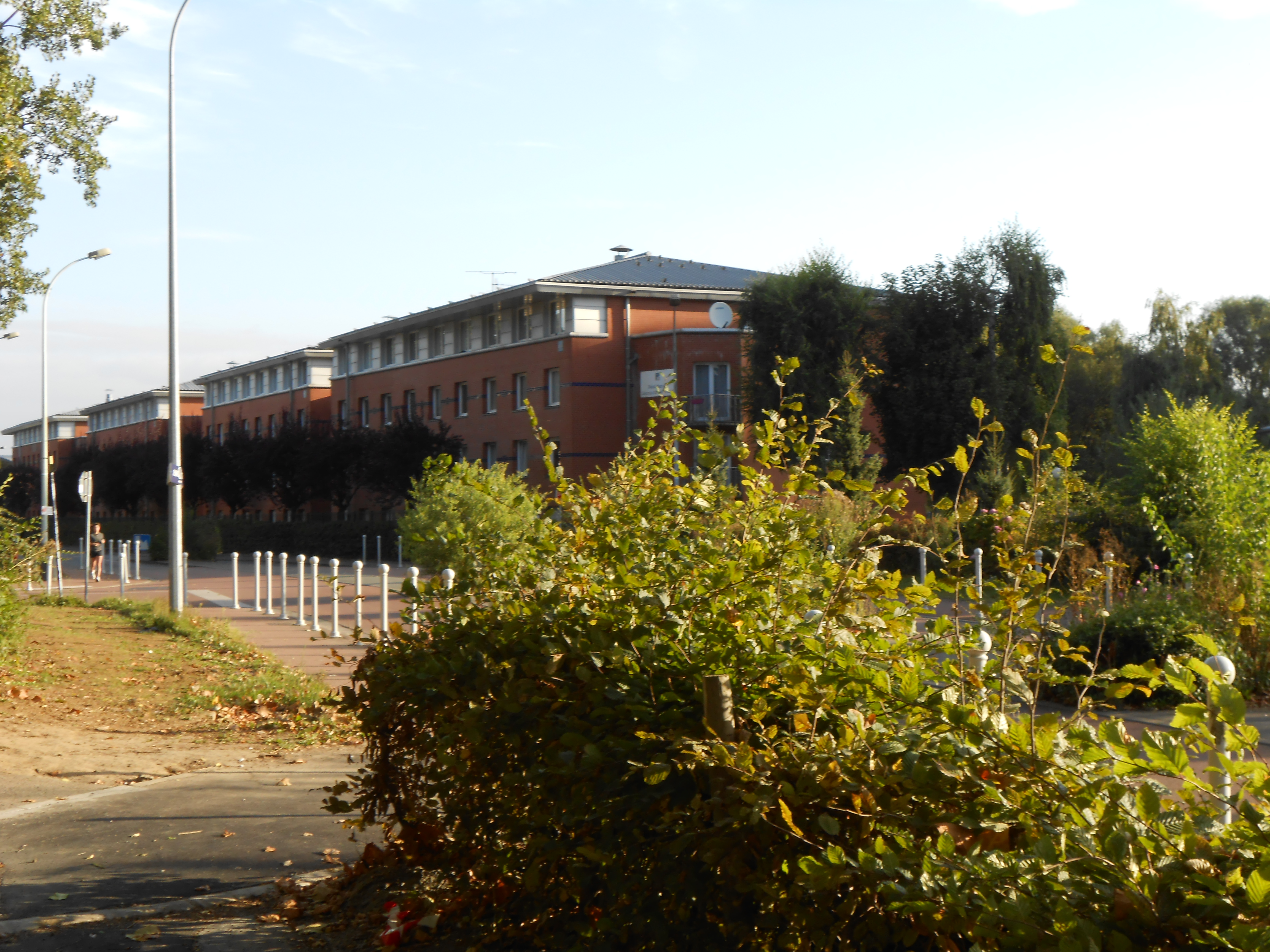 Résidence étudiante Léonard de Vinci - Ecole centrale de Lille - Cité scientifique Villeneuve d'Ascq, Lille Métropole